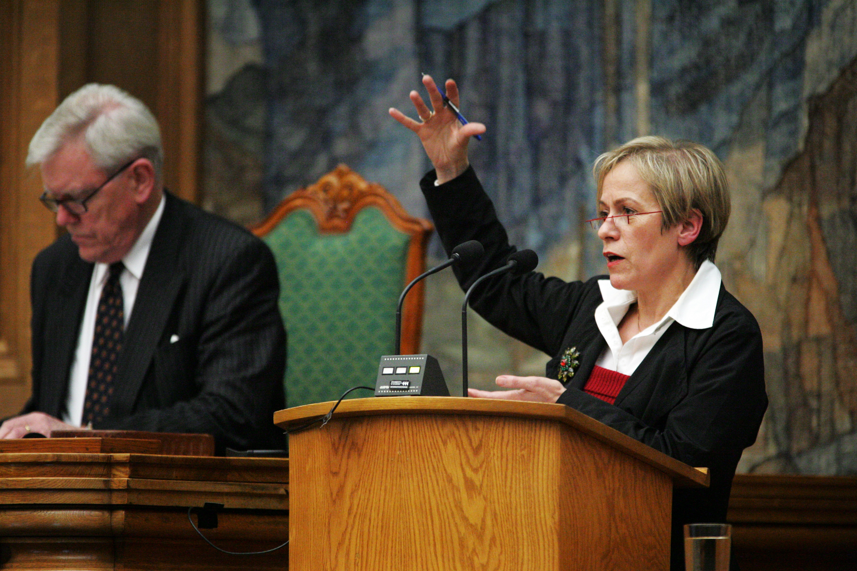 Ingibjörg Sólrún Gísladóttir (s) Island, talar vid Nordiska rådets session i Köpenhamn 2006.